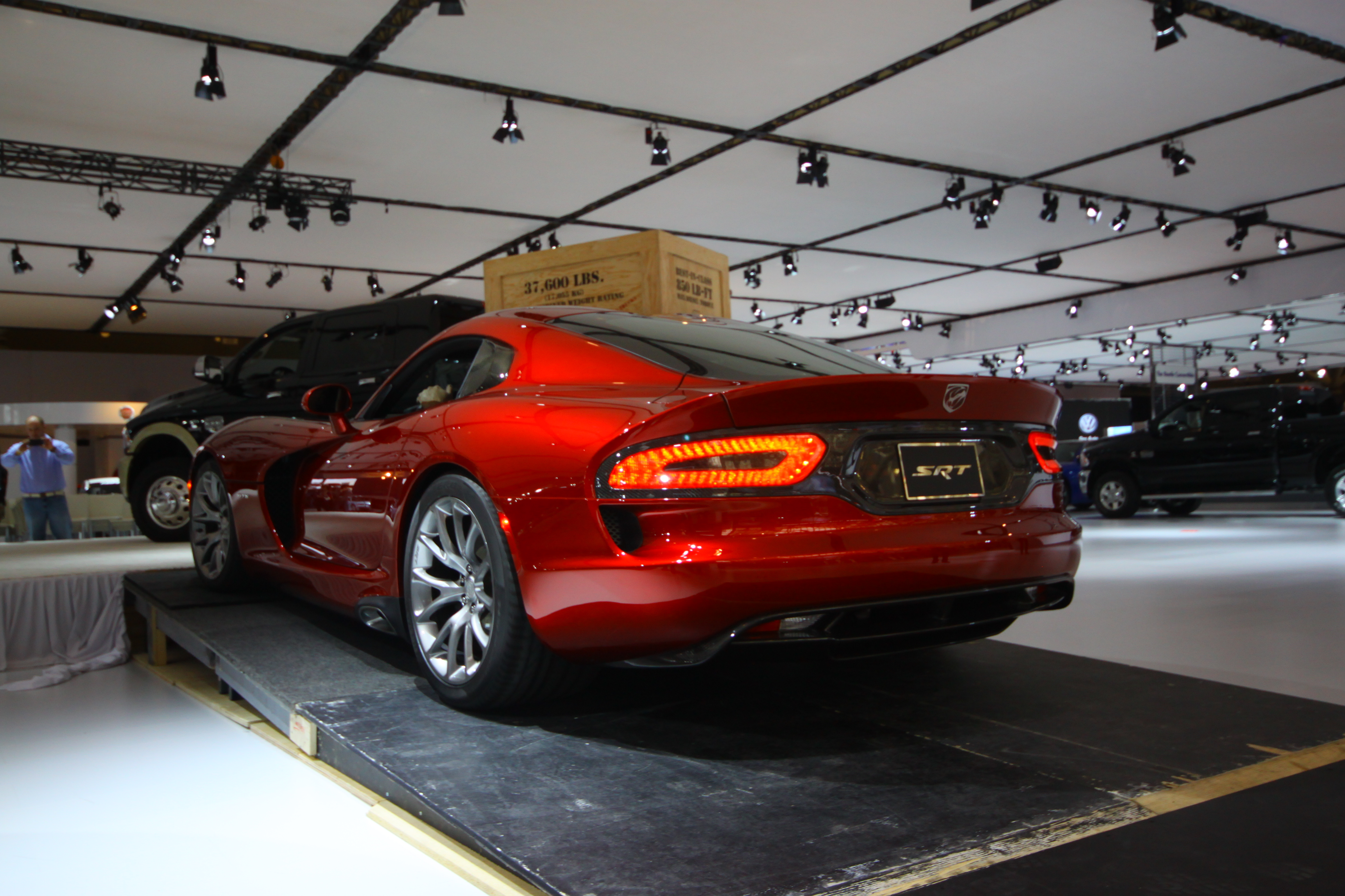 SRT Viper